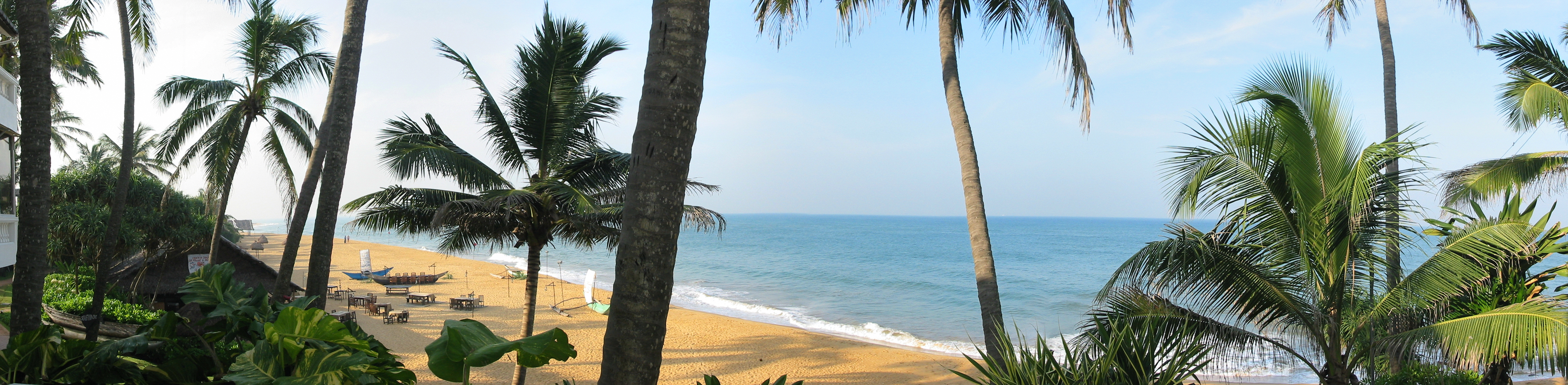 Sri Lanka, Mount Lavinia Hotel